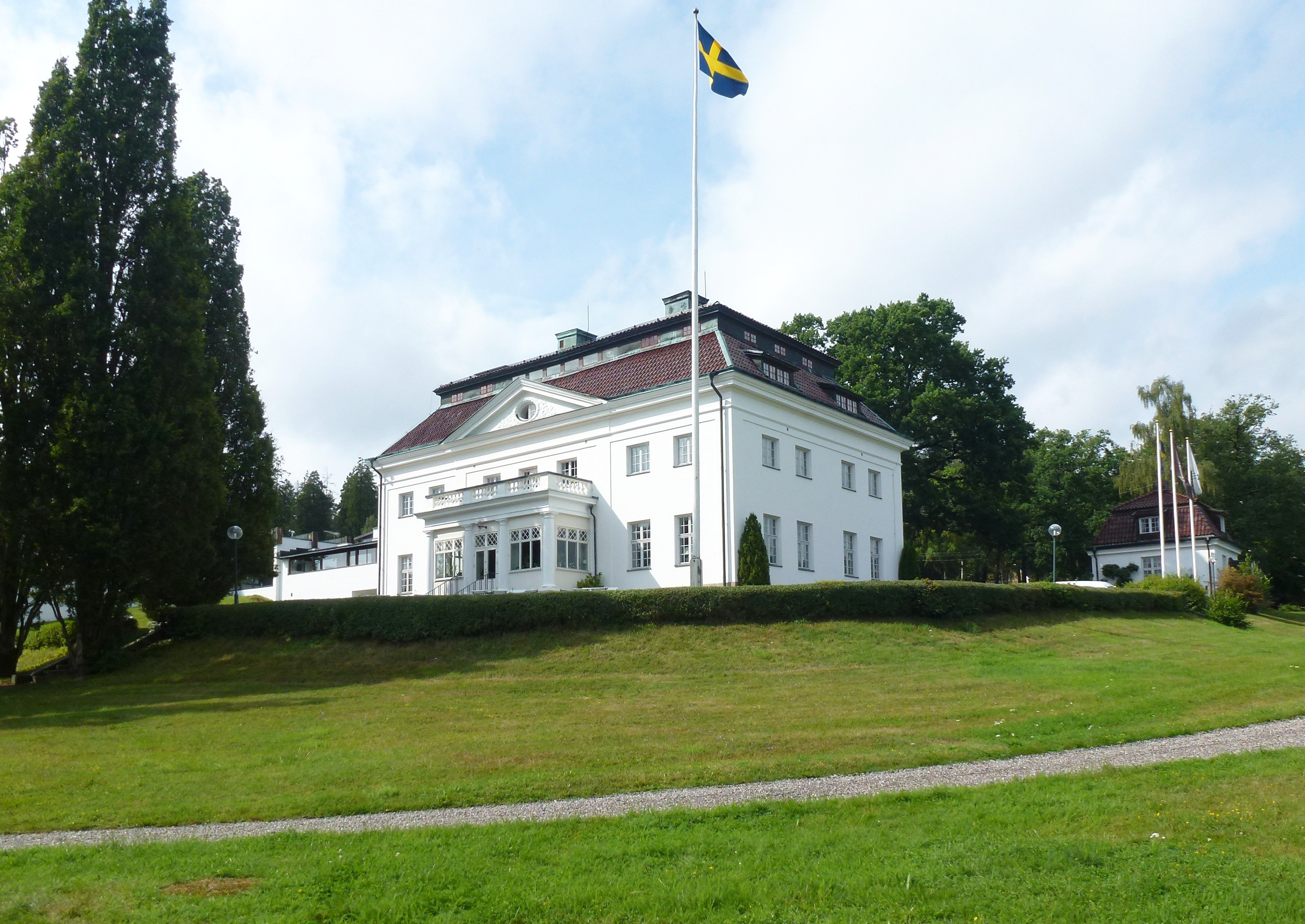 Bergendahls herrgård